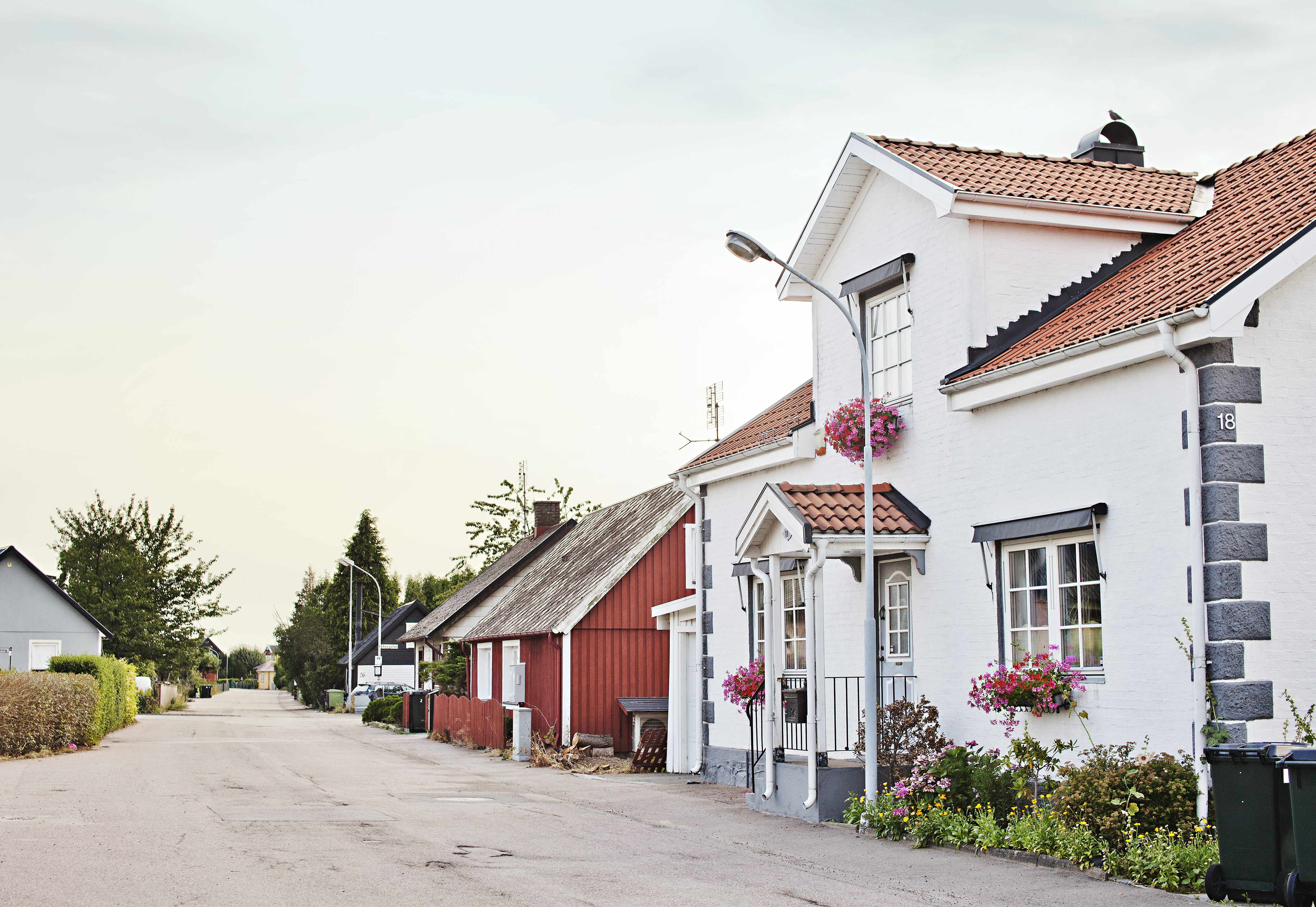 Villagata i Ekeby.